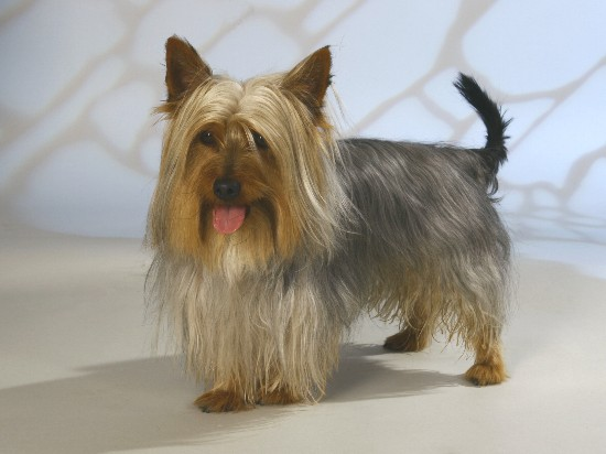 Australian Silky Terrier Tjark1 2006